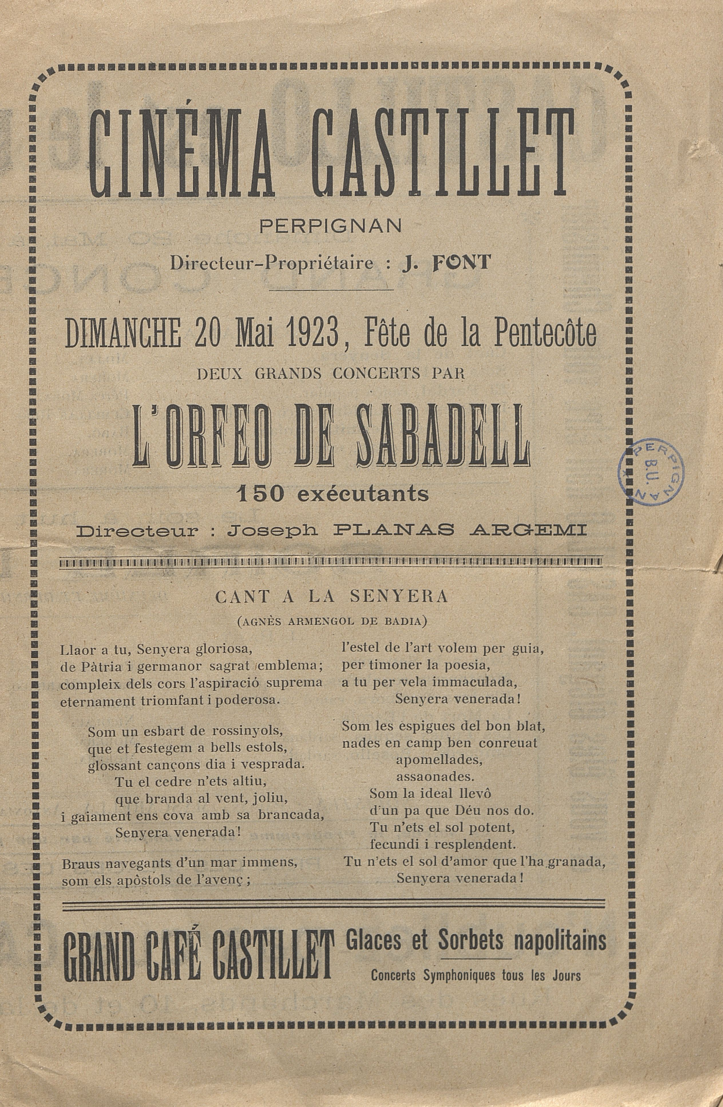 Patrimoine numérisé de l'Université de Perpignan, consulté le 9 juillet 2018